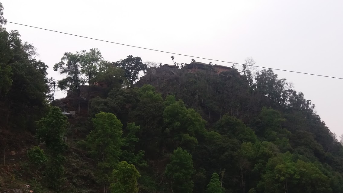 नेपाली: गोरखा दरवार